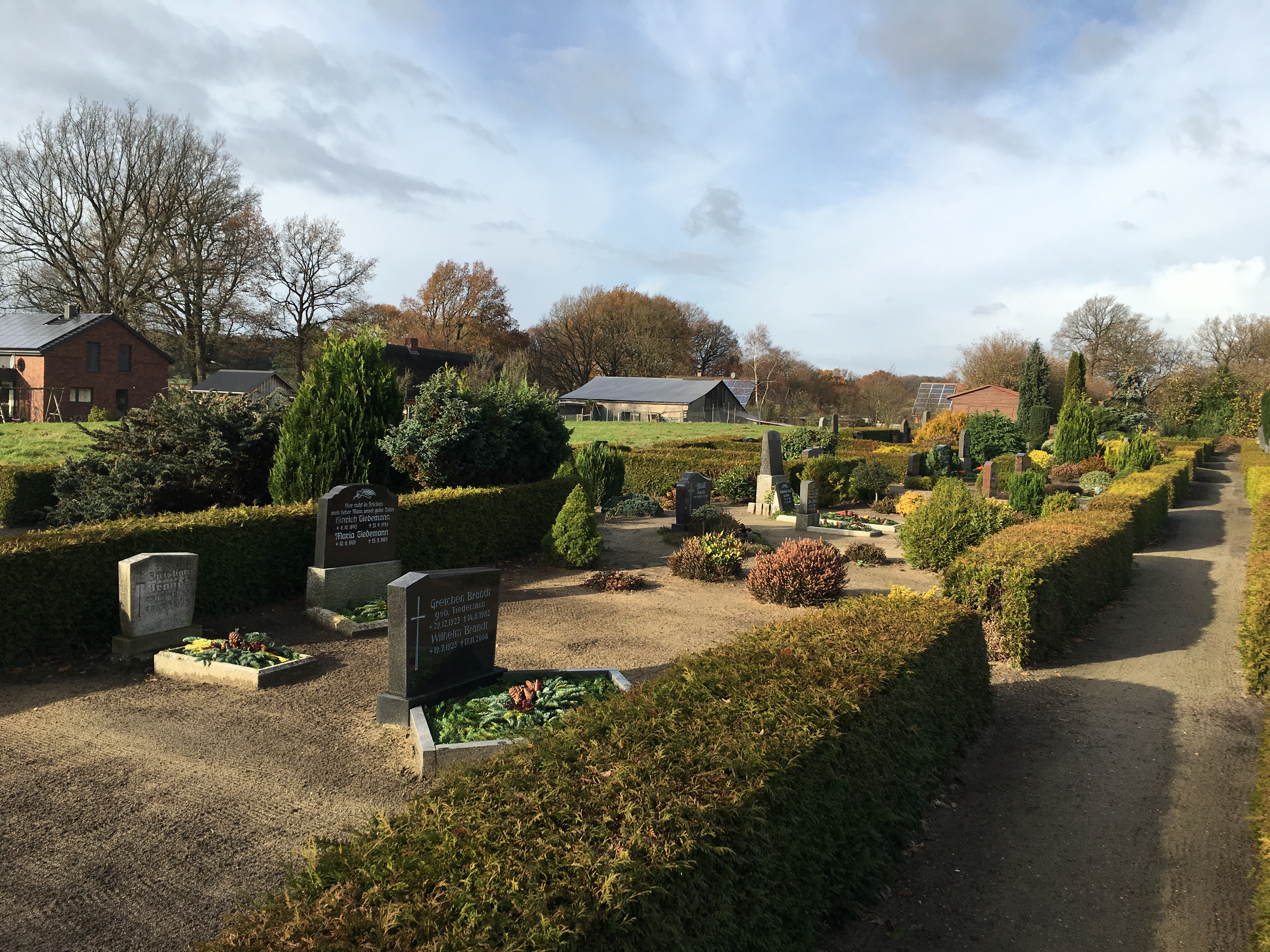 Graffsteen op’n Karkhoff Armsdörp